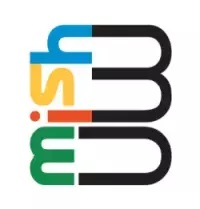 Logo Międzywydziałowych Indywidualnych Studiów Humanistycznych i Społecznych Uniwersytetu Warszawskiego.